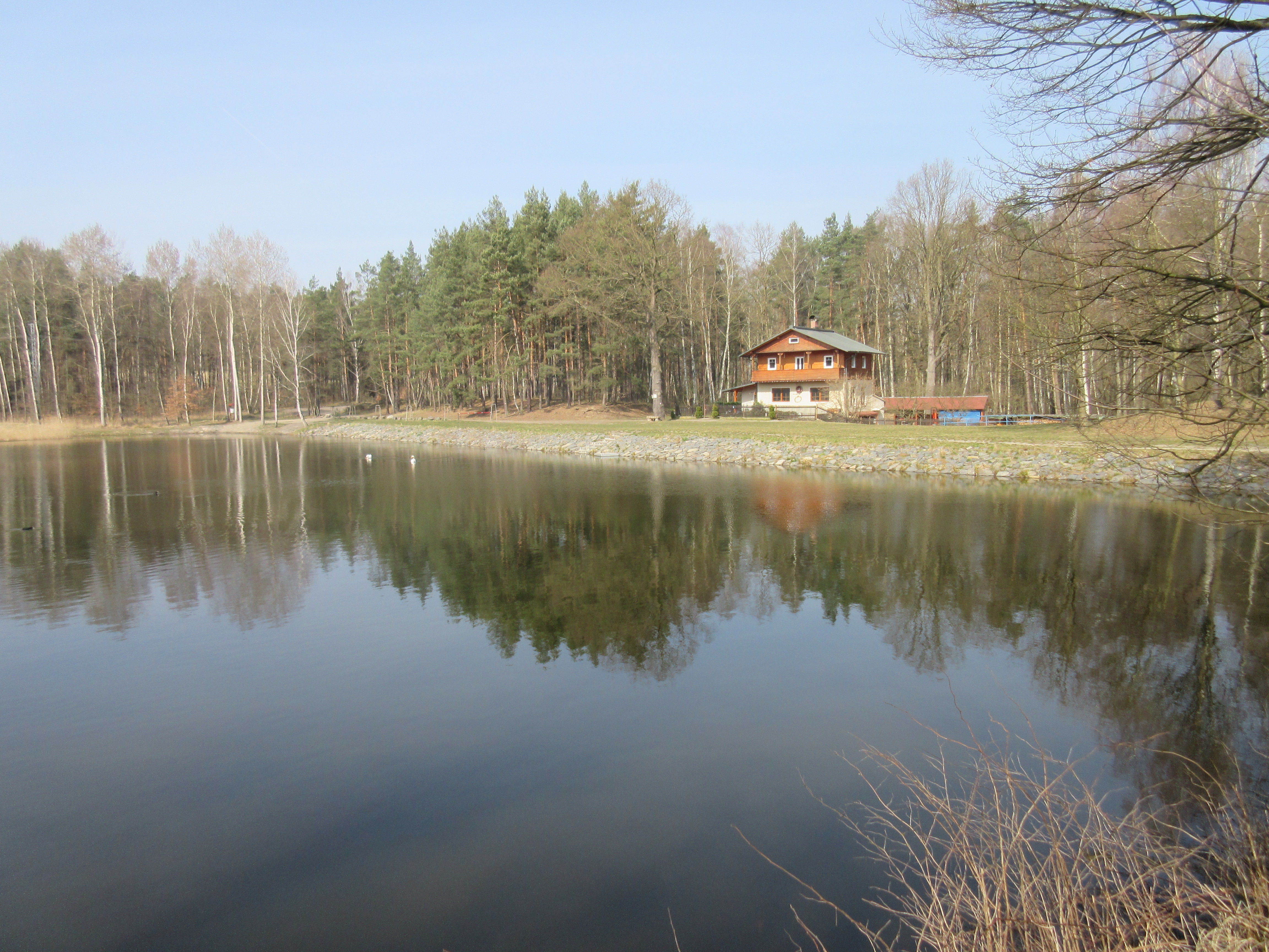 Žizníkovský rybník z okraje